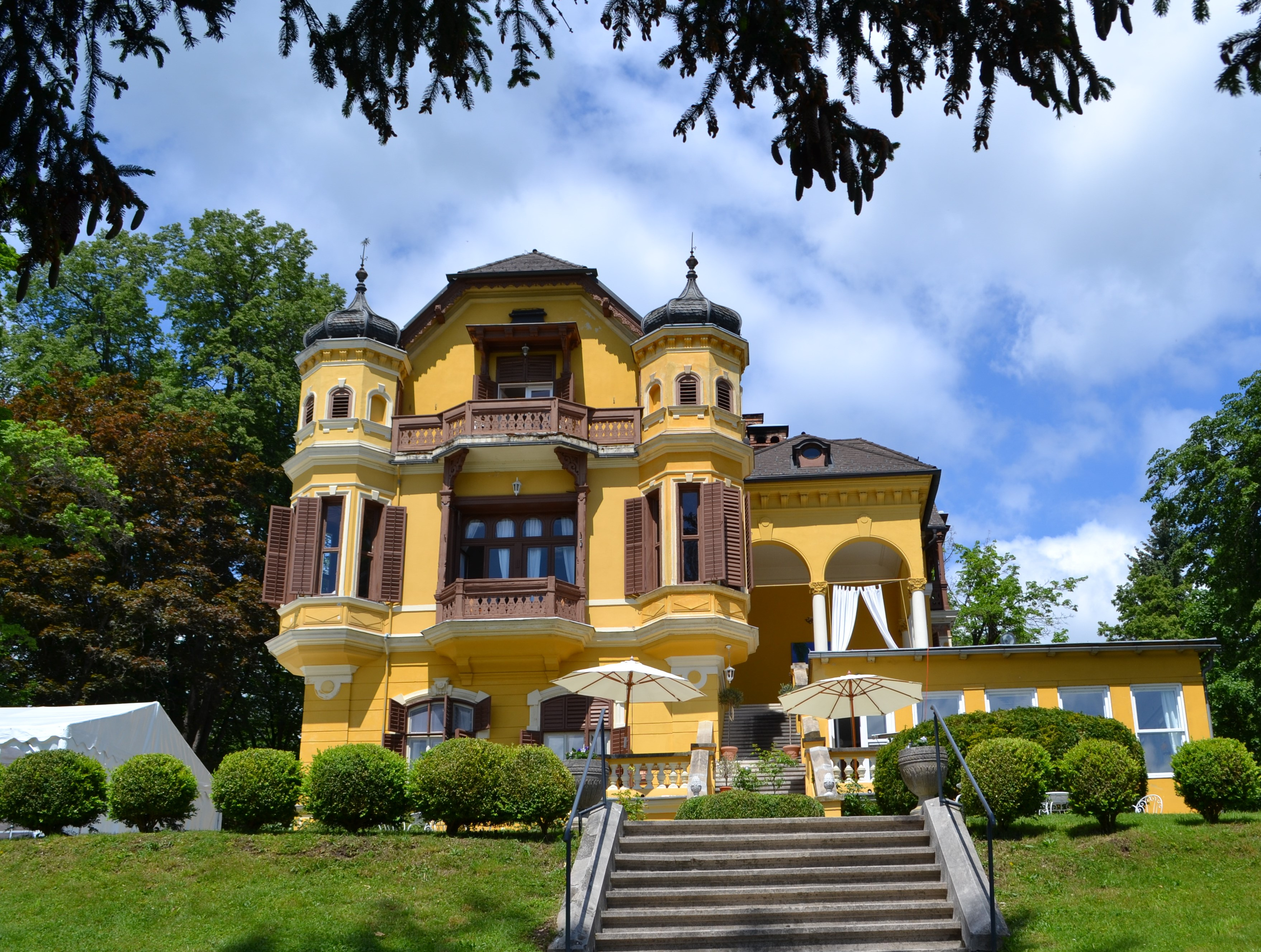 Schlossvilla Miralago in Pörtschach am Wörthersee